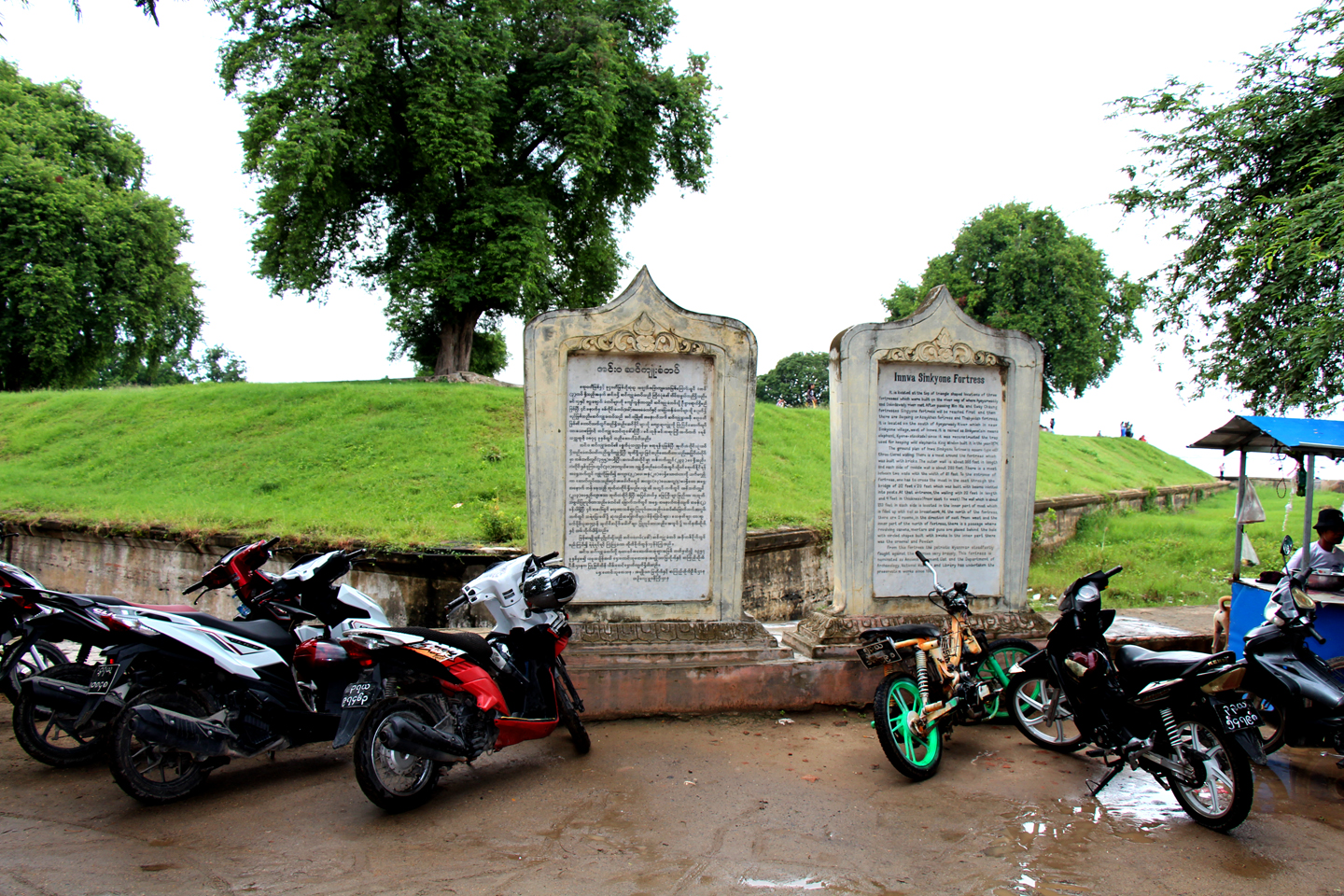 မြန်မာဘာသာ: အင်းဝ ဆင်ကျုံးခံတပ် ကျောက်စာများ